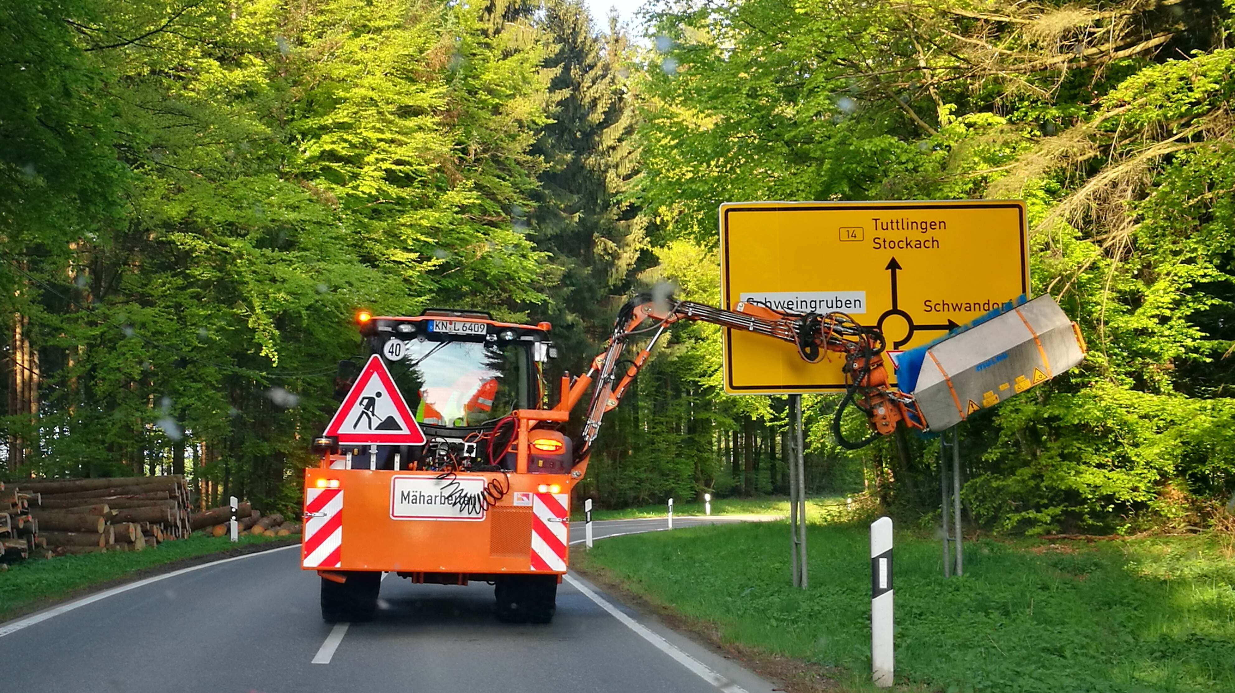 Deutschland (D) - Baden-Württemberg (BW) - Landkreis Konstanz (KN) - Gemeinde Eigeltingen: Reinigung des Vorwegweisers an der K6110 von Mühlingen kommend